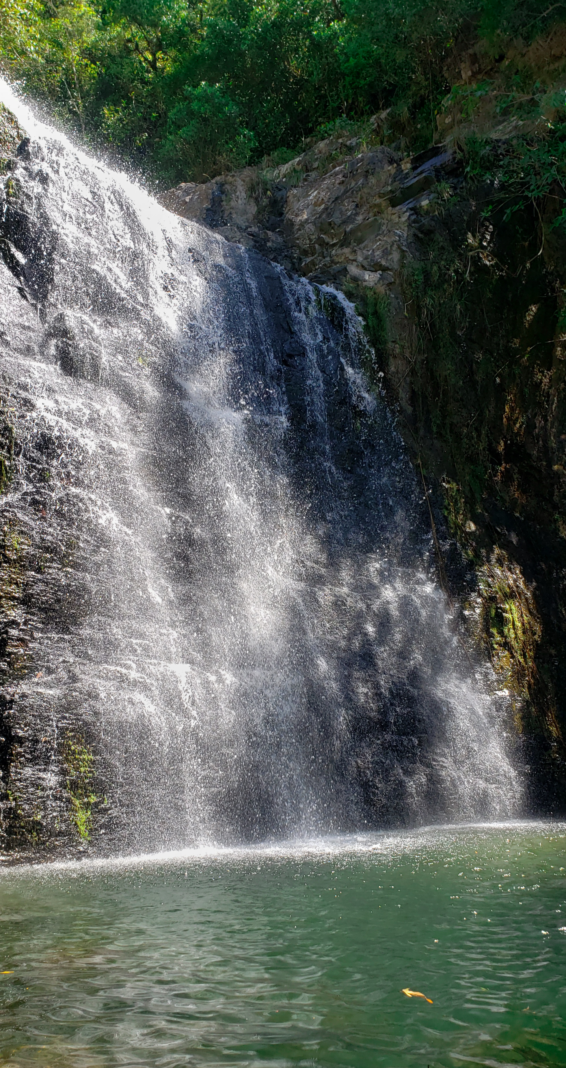 Chorro las Mesitas, ubicado en el distrito de Olá